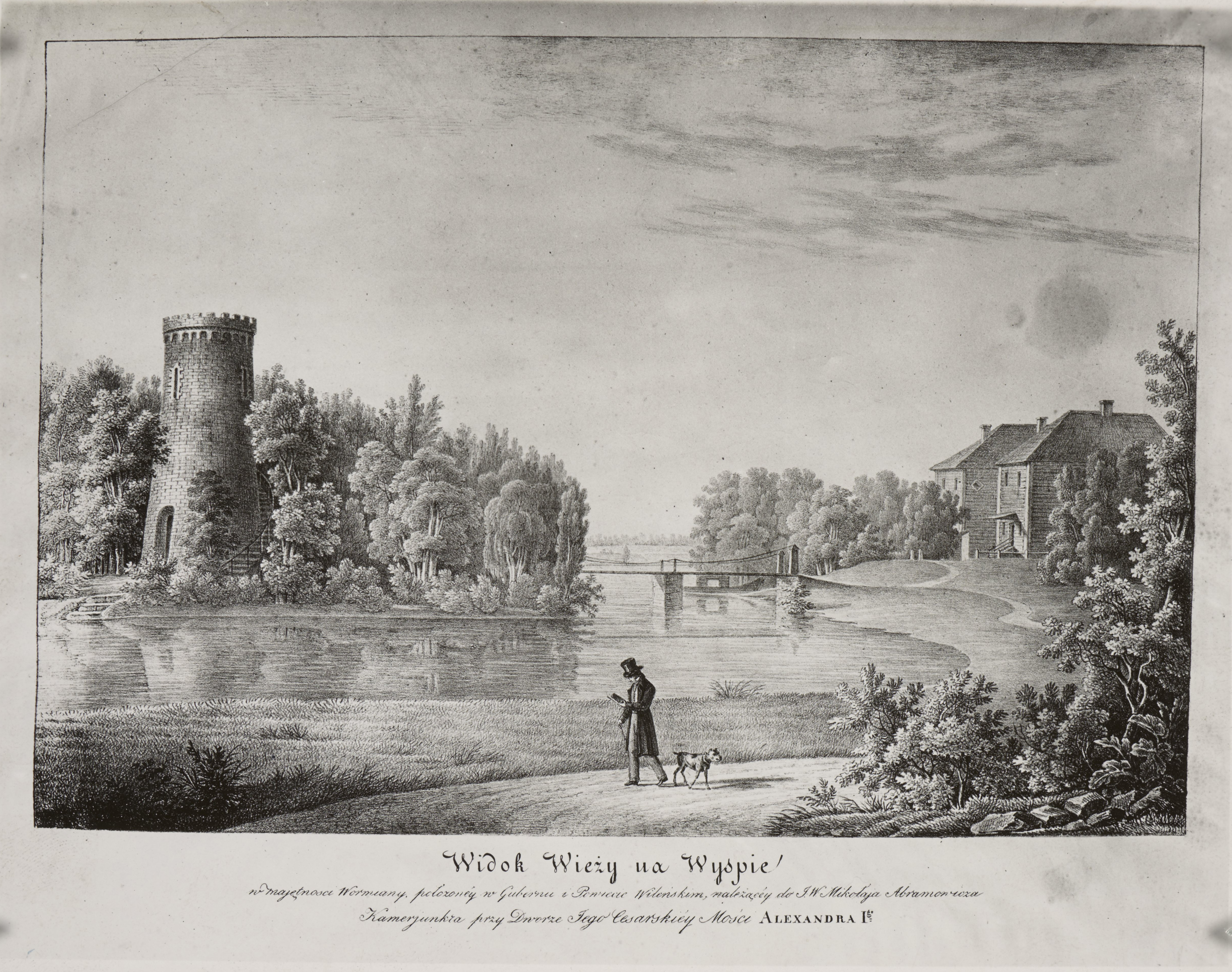 Беларуская (тарашкевіца): Варняны (Varniany), сядзіба Абрамовічаў (Abramovič)